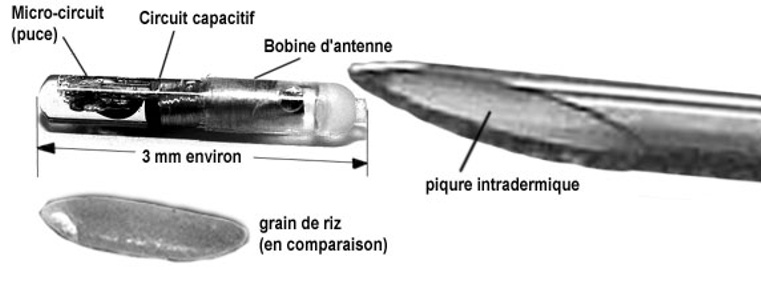 La micro-puce sous cutanée possède un émetteur-récepteur qui transmet sous forme d'un train d'impulsions, un signal numérique composé de 85 éléments de données. Mais cette puce radiofréquence (RFID) n'est pas un émetteur de données. Elle ne s'active que si elle est sollicitée par un scanner spécifique. Cela s'apparente davantage aux code-barres d'un produit de supermarché. Source : adapté de "Nanoinformatique et intelligence ambiante - Inventer l'ordinateur du XXIème Siècle" Jean-Baptiste Waldner, Hermes Science, London, 2007 OTRS ticket 2011051210004131 confirmes that User:Jbw (the original uploader) is Jean-Baptiste Waldner.